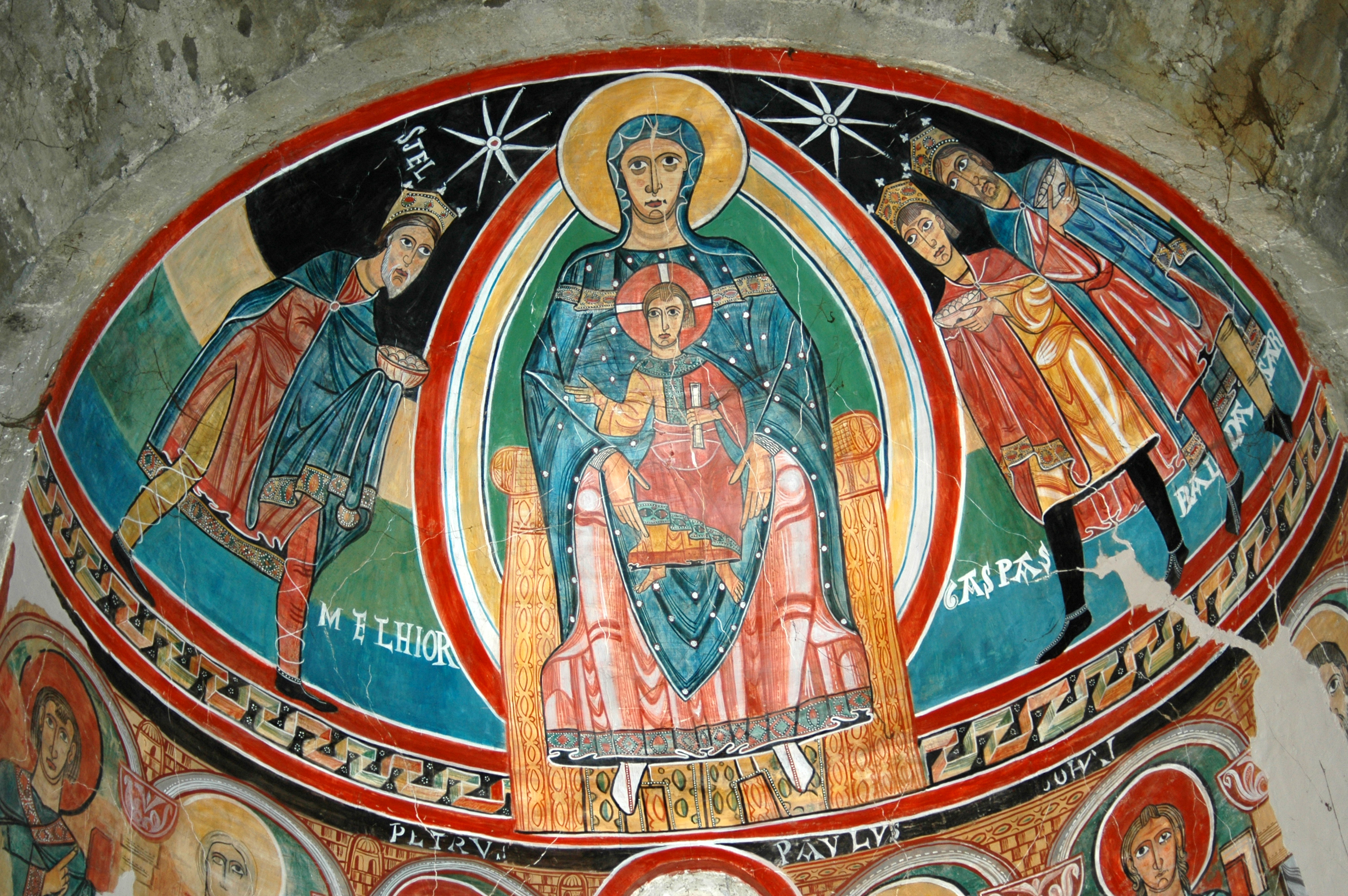 Església de Santa Maria de Taüll (la Vall de Boí)